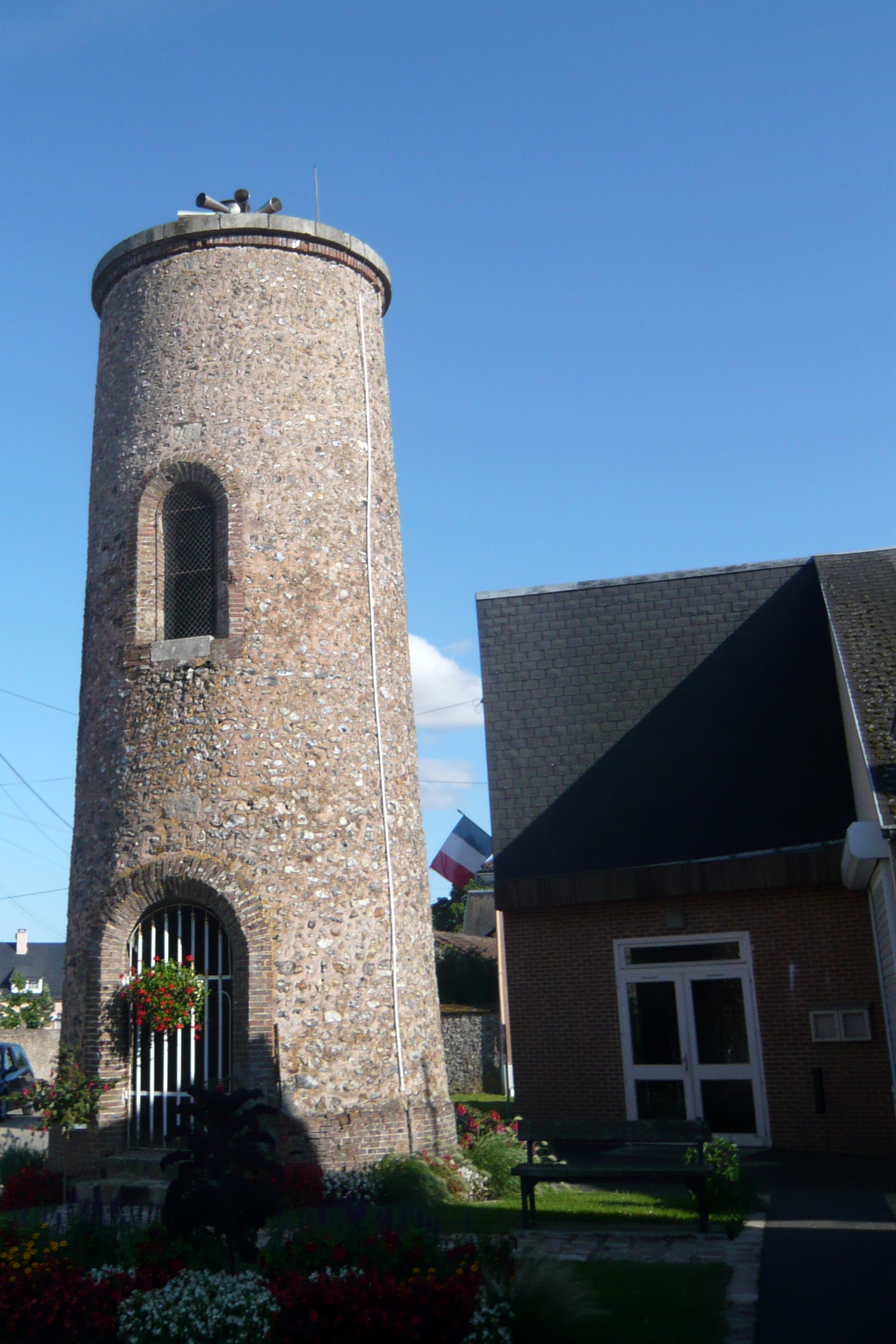 Ancienne éolienne, Chartainvilliers, Eure-et-Loir (France).